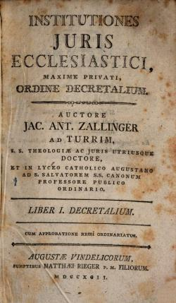 Jakob Anton von Zallinger zum Thurn Institutiones juris ecclesiastici maxime privati 1792